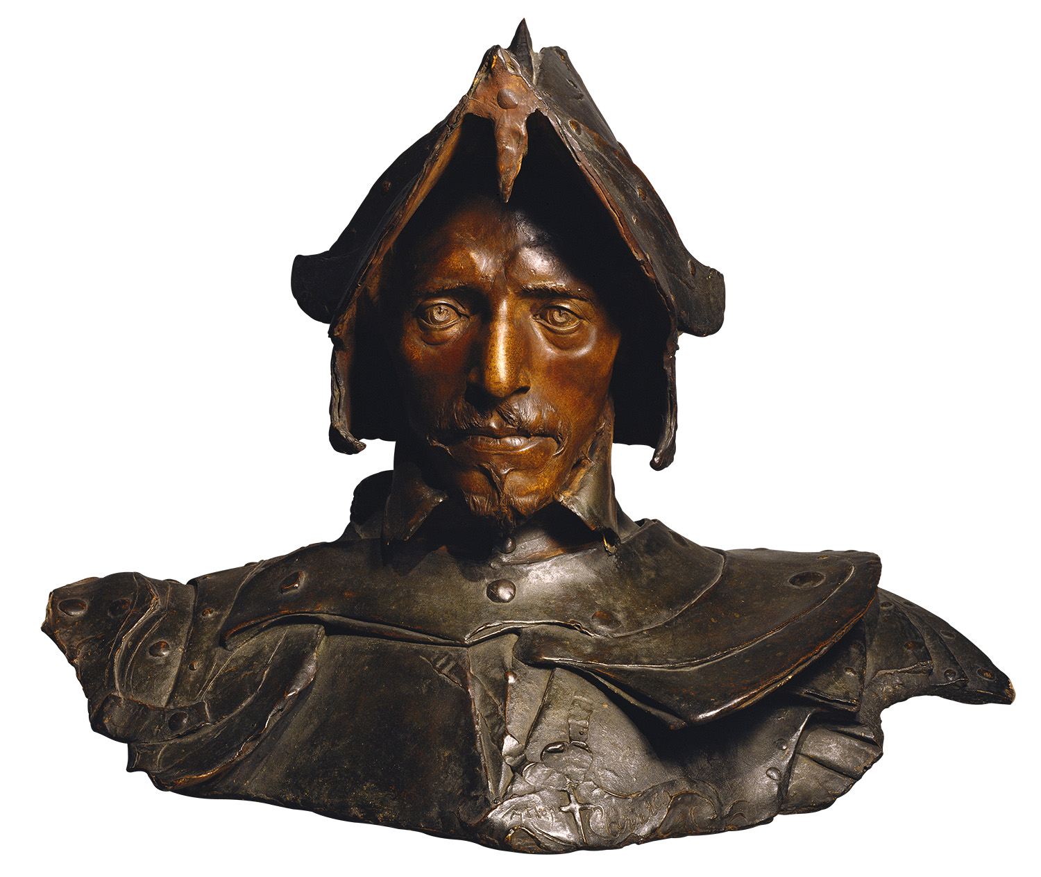 Sculpture Le Guerrier Grand céramiste et sculpteur symboliste de la fin du XIXe siècle